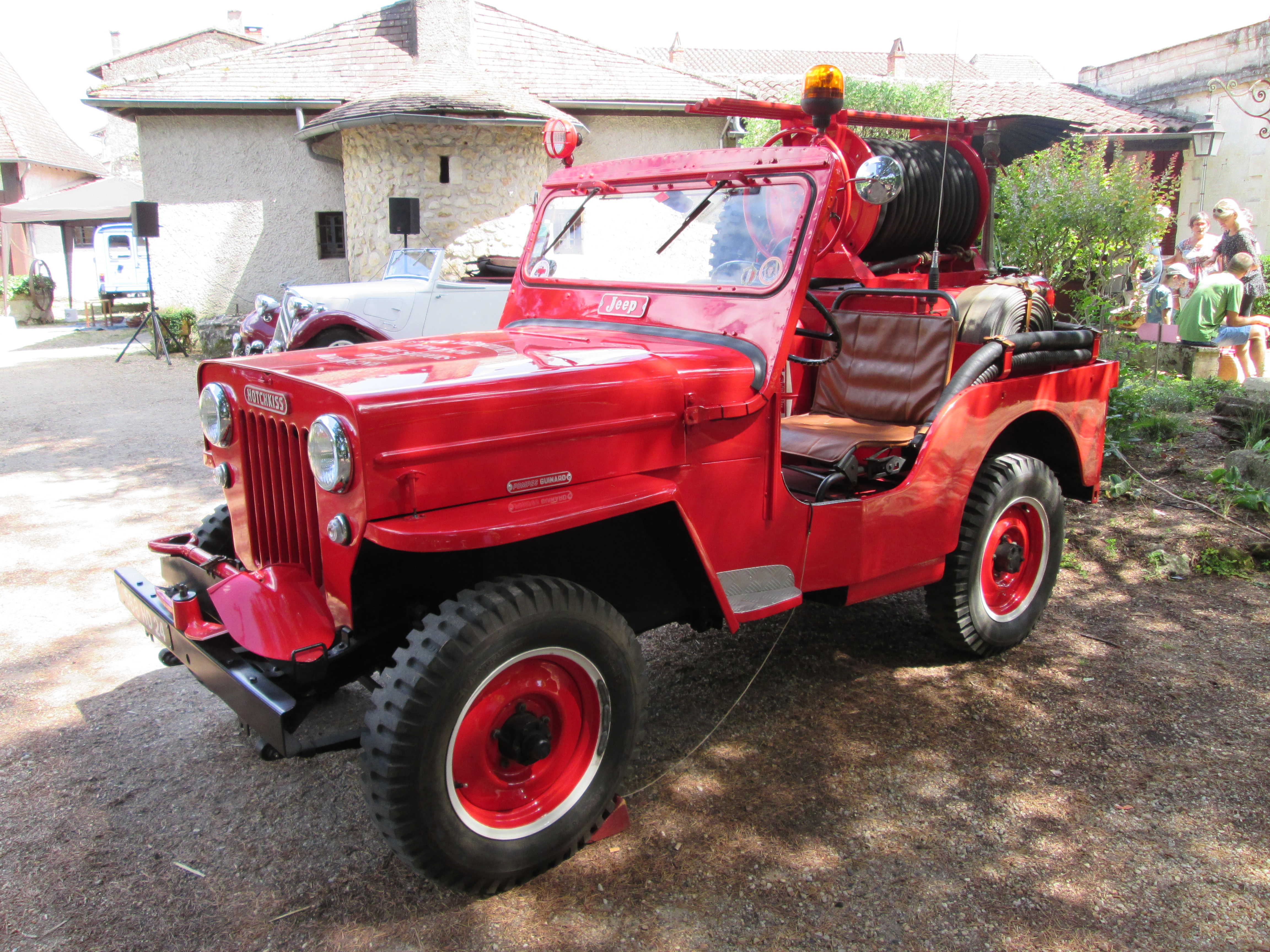 Camion-citerne feux de forêts léger (CCFL) Hotchkiss JH-102 (aussi appelé Hotchkiss M201, Jeep). Pompes Guinard. Service départemental d'incendie et de secours de la Dordogne. Au parc Voulgre, Mussidan (Dordogne, France).